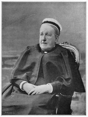 Freule Anna Teding van Berkhout